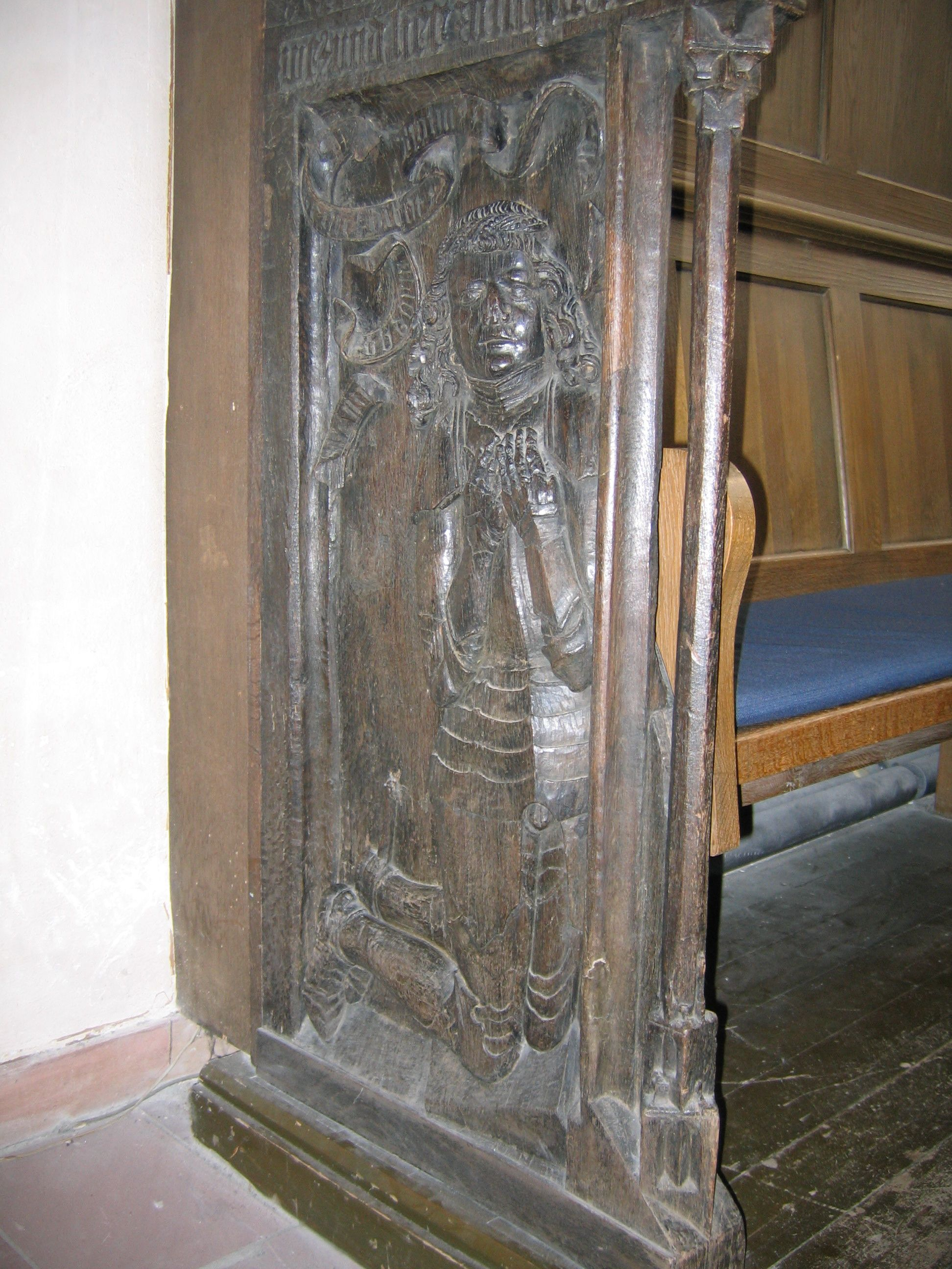 Graf Reinhard IV. von Hanau-Münzenberg: Chorstuhlwange in der Marienkirche in Hanau